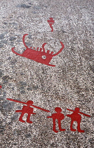 Gravure préhistorique de Tanum, Suède